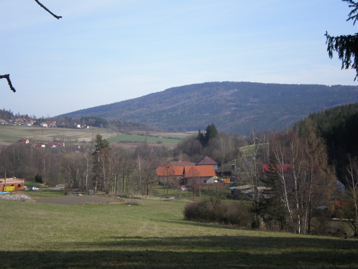 Hora Plešivec (654 m) od obce Ohrazenice u Jinec, Brdy.